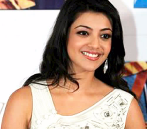 Kajal Aggarwal at Zee Cine Awards 2012